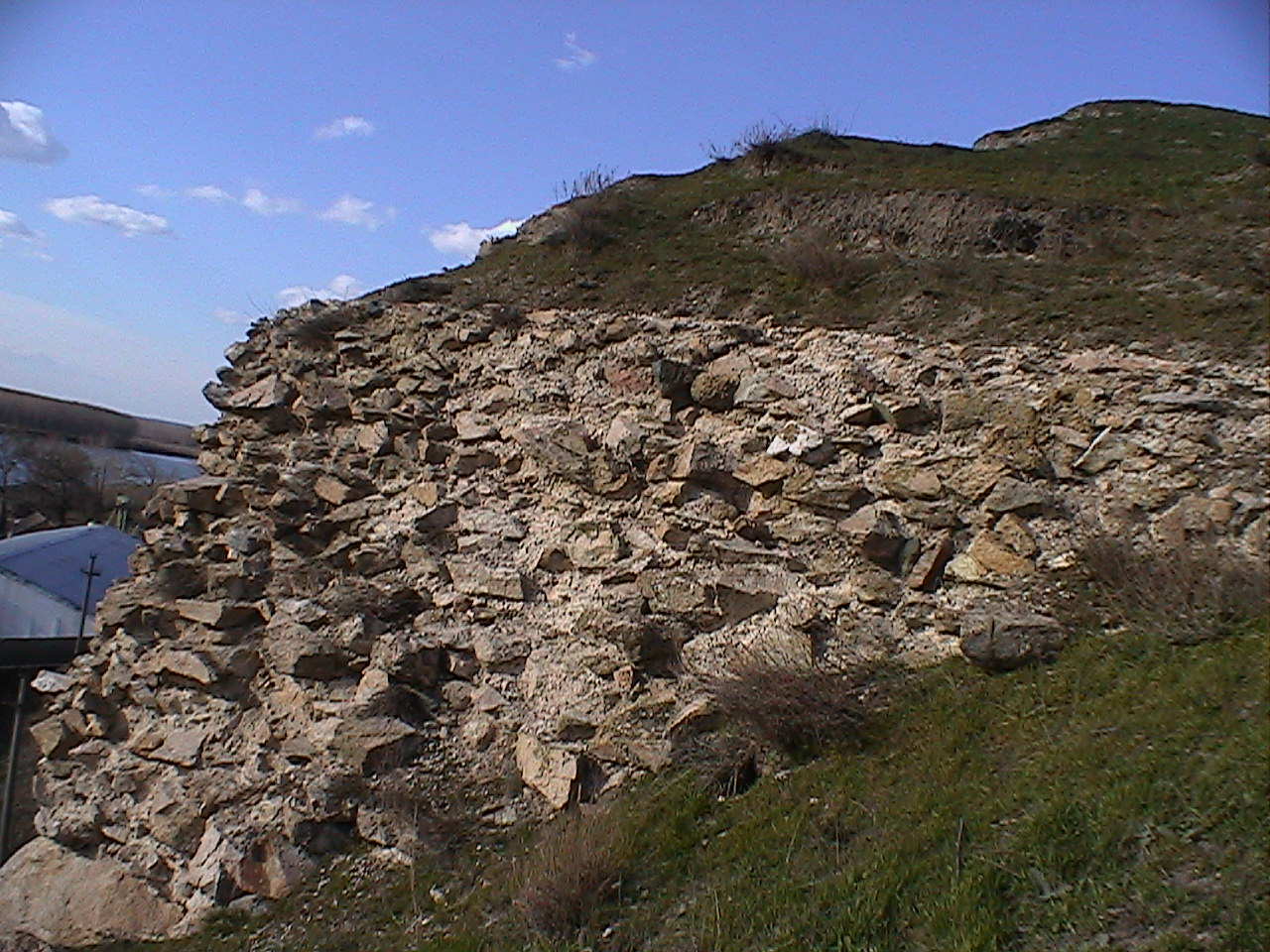 Cetatea Arrubium 02